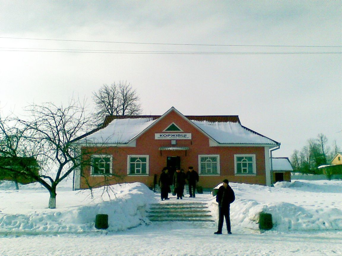 Вокзал на станції Коржівці Південно-Західної залізниці